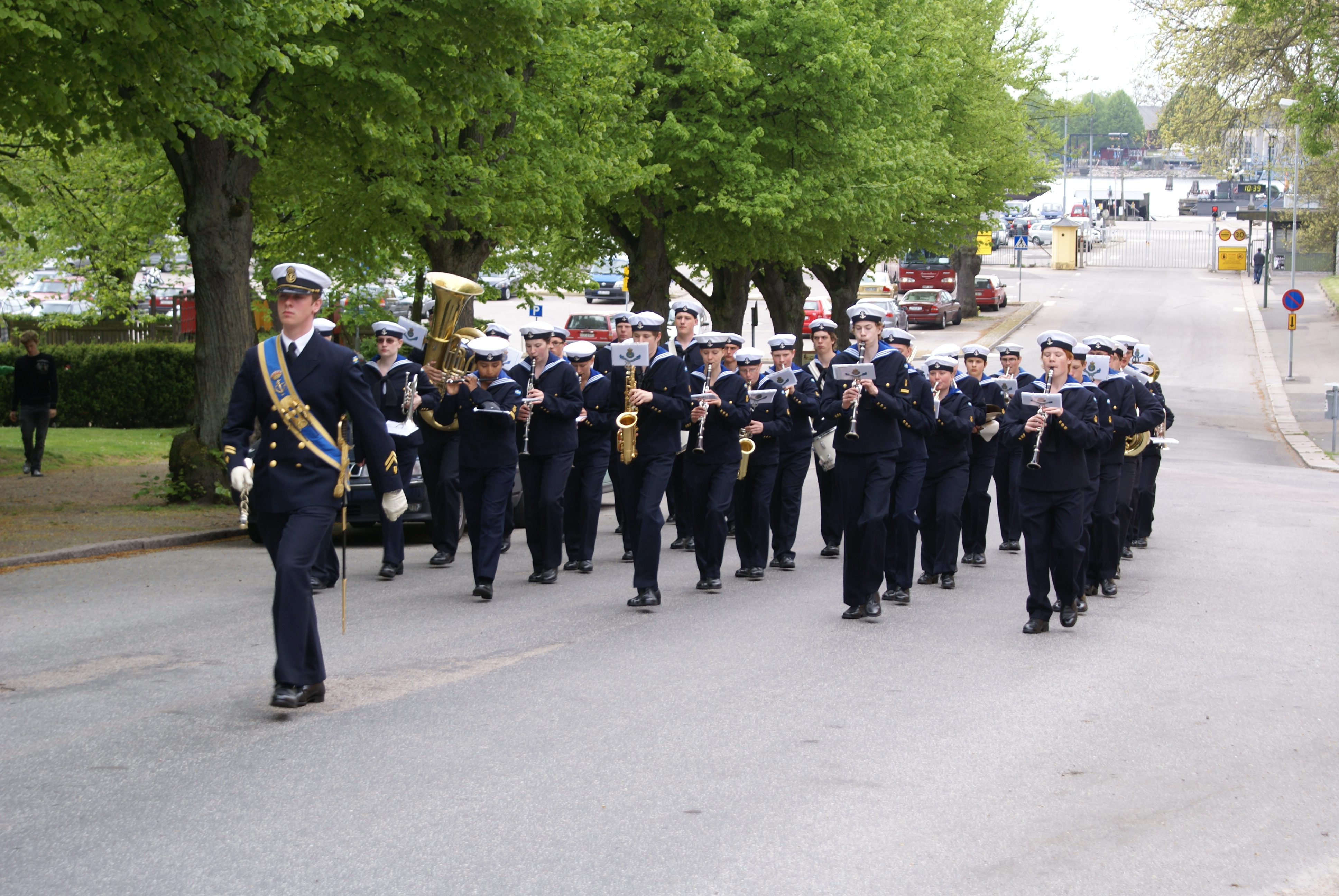 Marinens Ungdomsmusikkår på marsch 080517